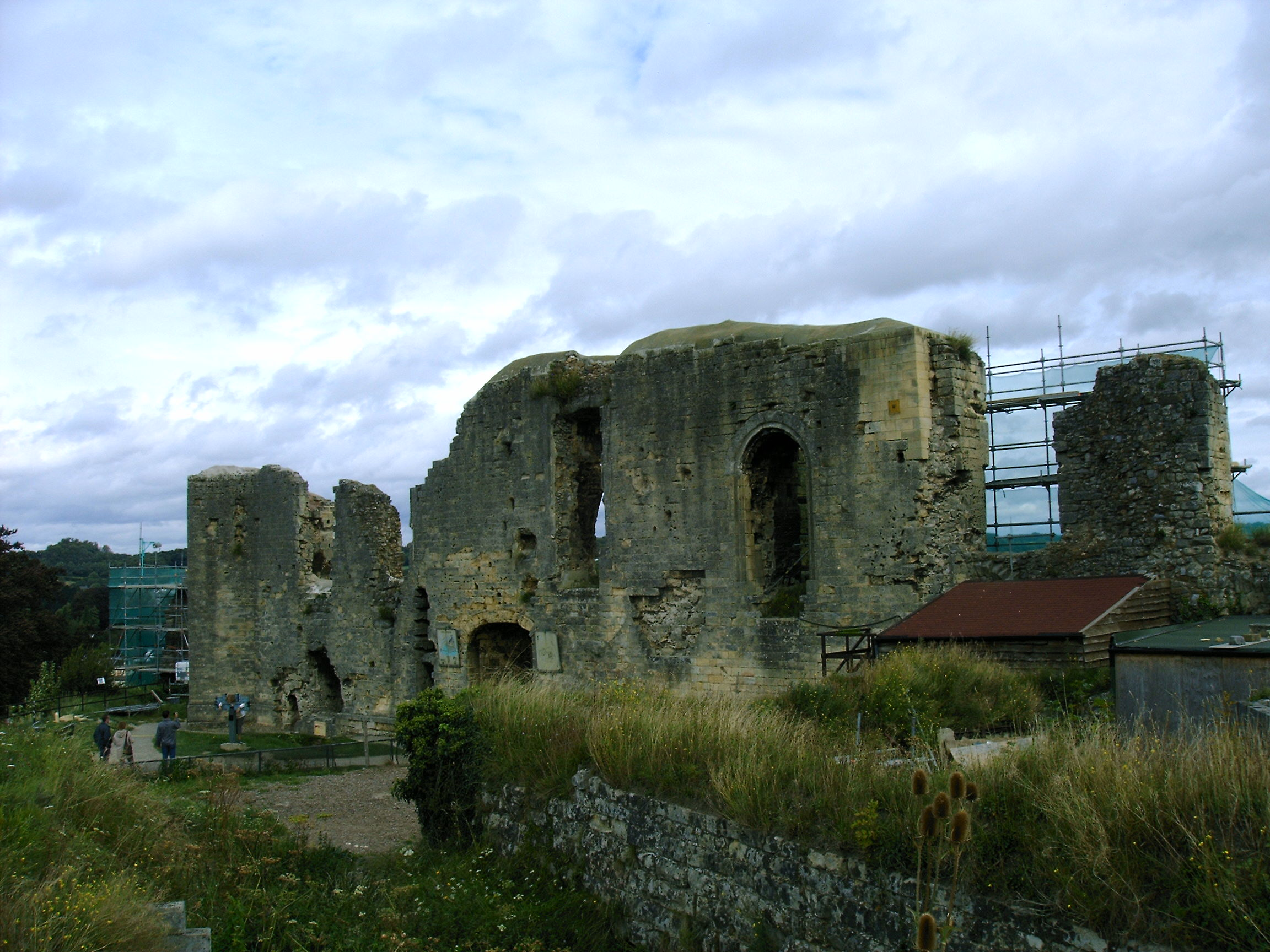 Het kasteel gezien vanaf de Lourdesgrot